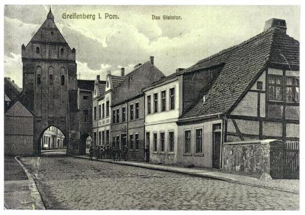 Brama Kamienna w Gryficach w 1910 roku